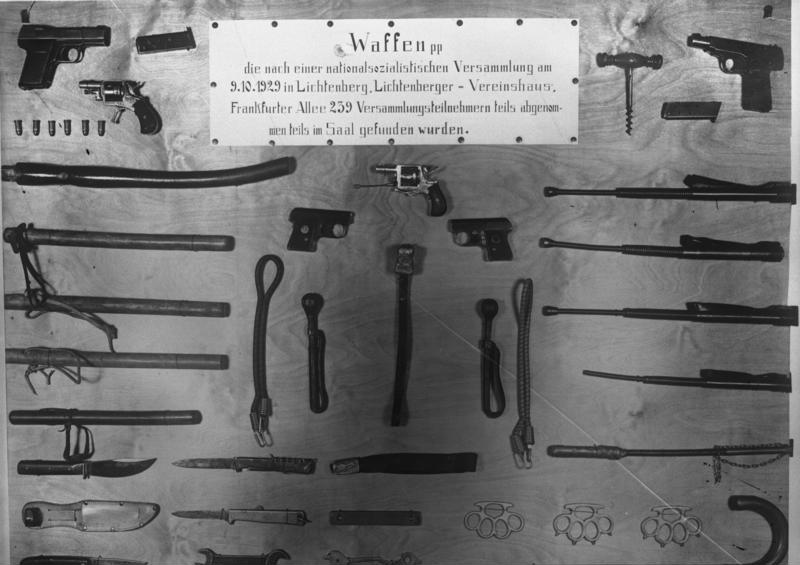 Waffenfunde bei den Nationalsozialisten! Der Minister des Innern Severing hat vor dem Landtag in seiner Rede auch die Waffenfunde erwähnt, die kürzlich in zwei nationalsozialistischen Versammlungen gemacht worden sind und hat die gefundenen Waffen, die auf Tafeln aufgezogen waren, im Landtag vorgezeigt.